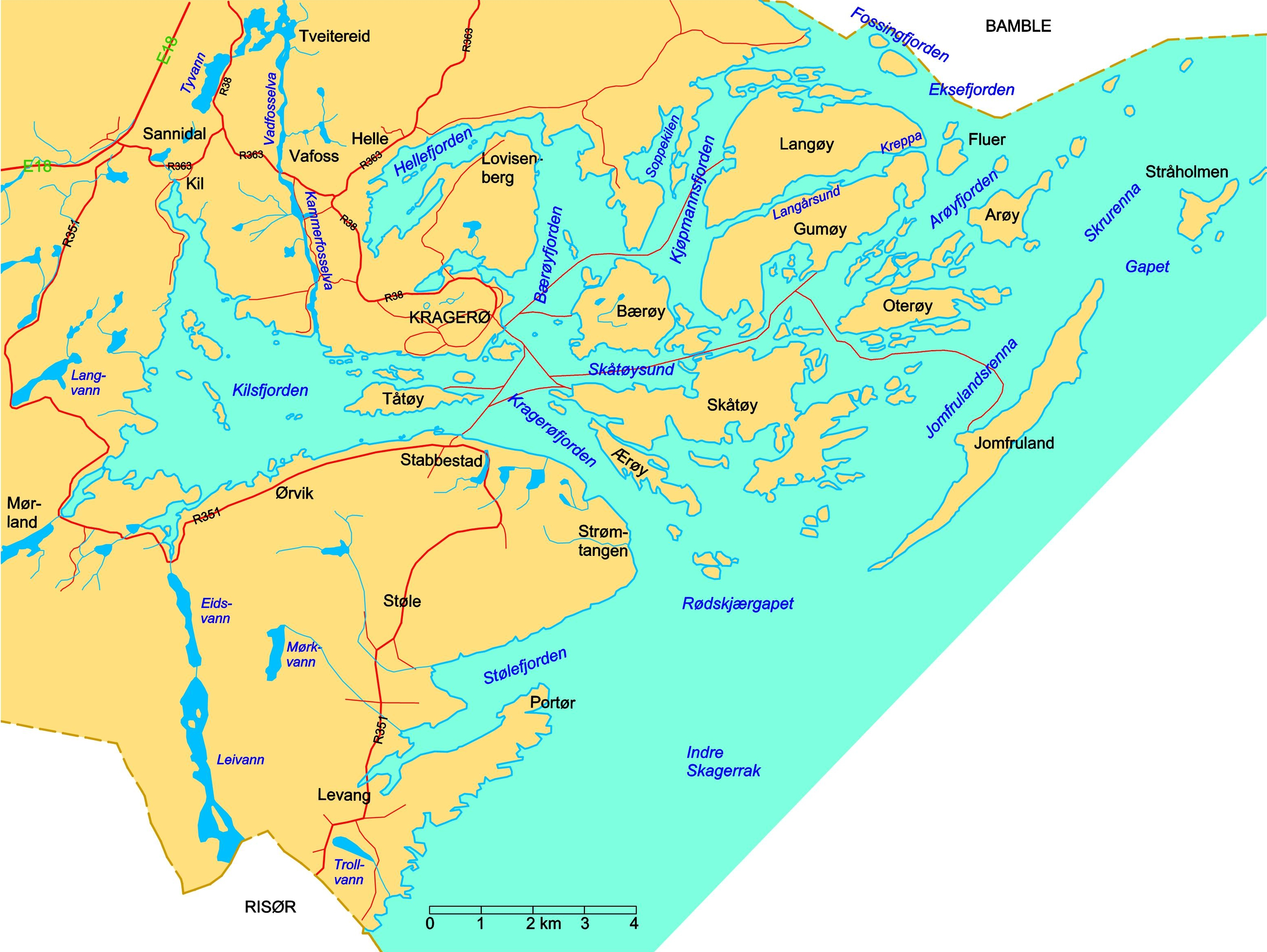 Kragerøs skjærgård